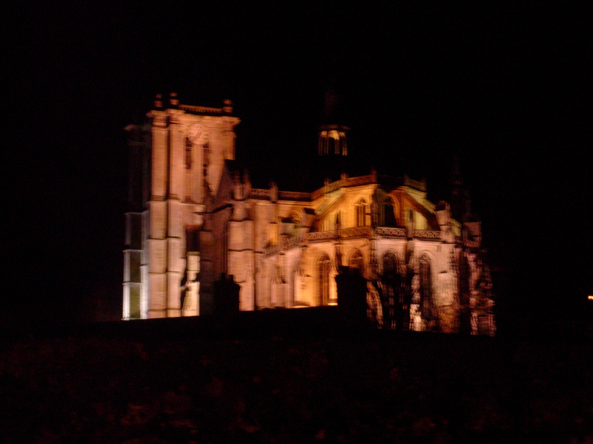 Eglise Saint-Jean-Baptiste de Chaumont-en-Vexin (60240) FRANCE photographie personnelle (utilisateur SebCE)